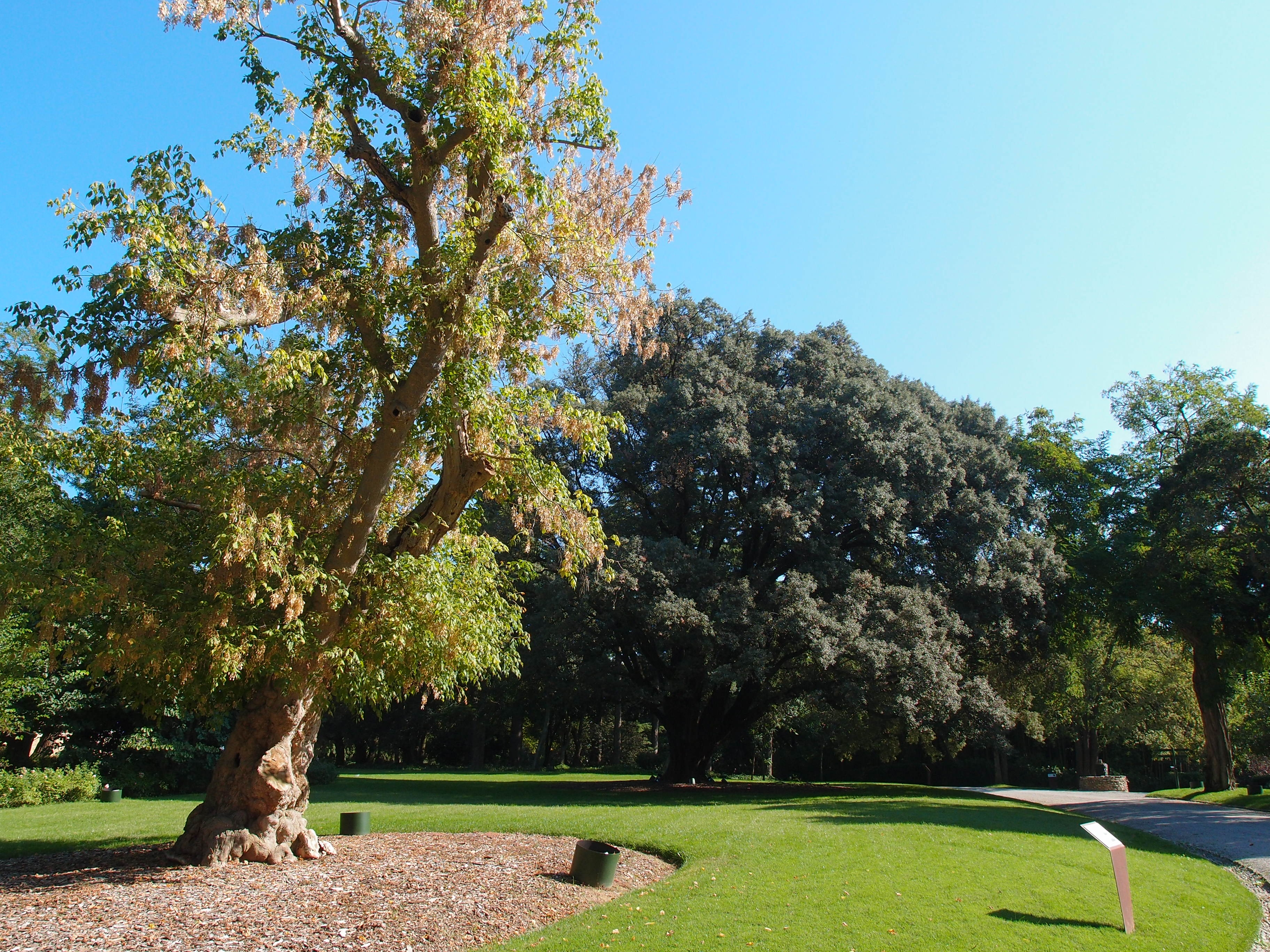 Castell von Peralada (Park) Datum: 28.09.2011 Urheber: M. Pfeiffer alias Benutzer:Gordito1869 Quelle: privates Fotoarchiv des Urhebers